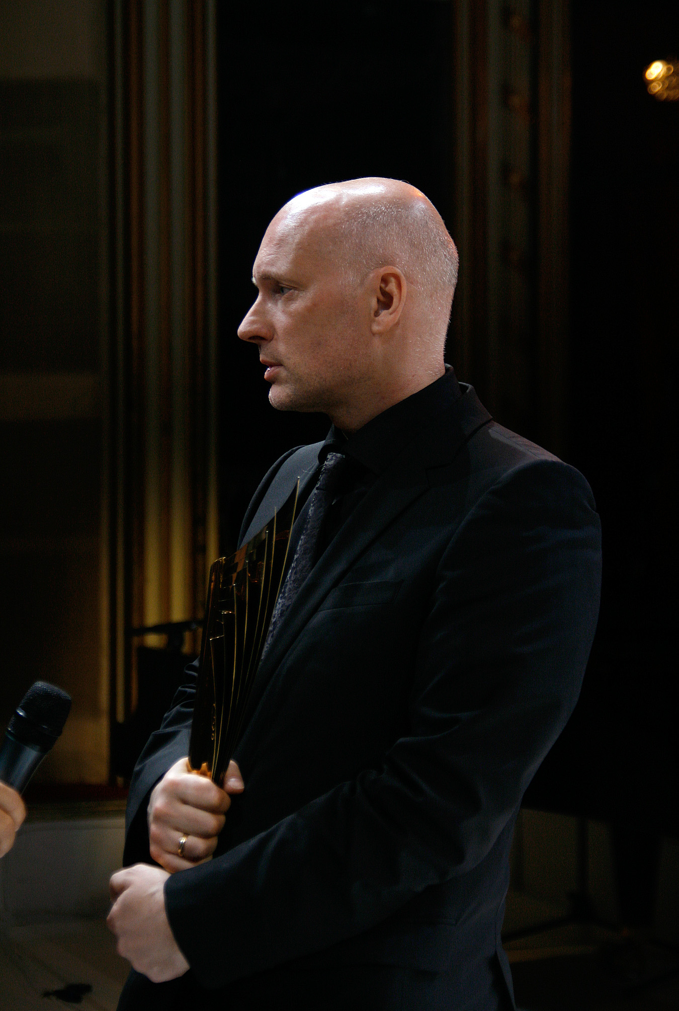 Alvis Hermanis, ausgezeichnet als bester Regisseur, bei der Verleihung des Nestroy-Theaterpreises 2010 im Burgtheater in Wien.